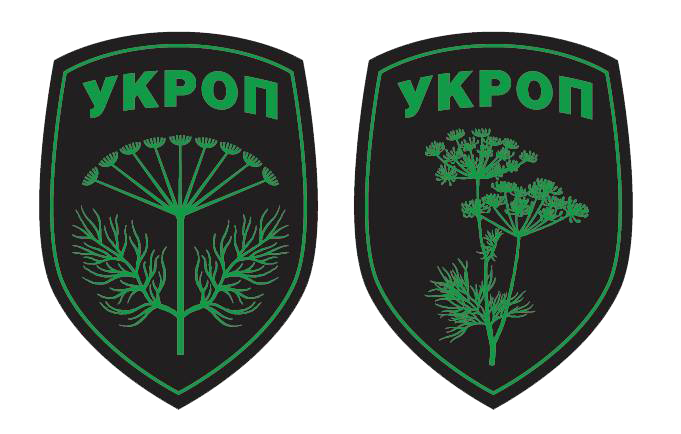 Емблема «УКРОП». Презентована президентом України Петром Порошенком у Марiуполi під час виступу перед працівниками Металургійного комбінату ім. Ілліча, 8 вересня 2014 року[1].